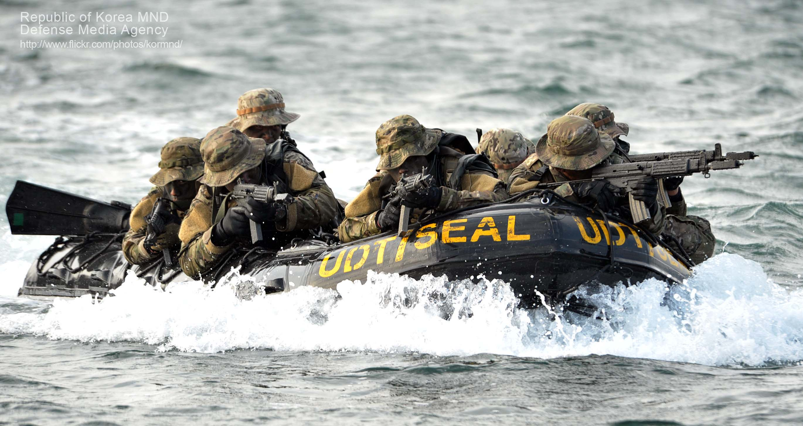 UDT/SEAL 장병들이 목표지역 수중 침투/타격훈련을 위해 고무보트에 탑승, 바다를 질주하고 있다. 촬영 - 김태형 기자